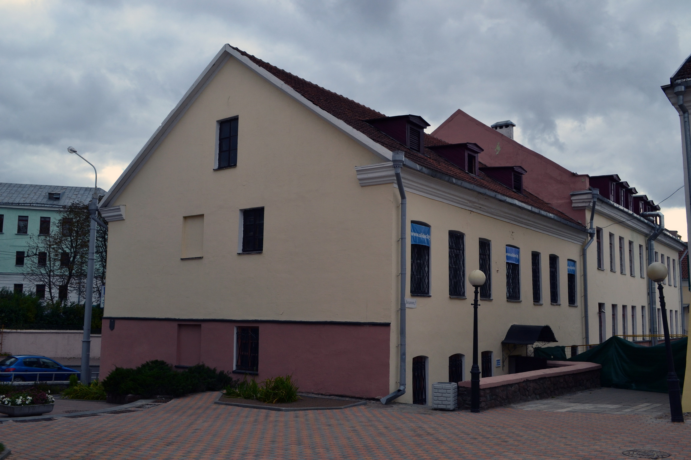 Беларуская (тарашкевіца): Гістарычны цэнтар Менску: цацачныя хаткі ў Траецкім прадмесьці This is a photo of Belarusian heritage monument. Reference number: 711Е000001 ( WLM)